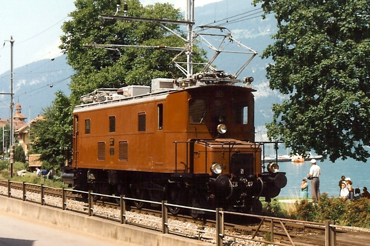 Die historische Lokomotive der BLS, EZB Ce 4/6 307, wärend der Lokomotivparade in Därligen